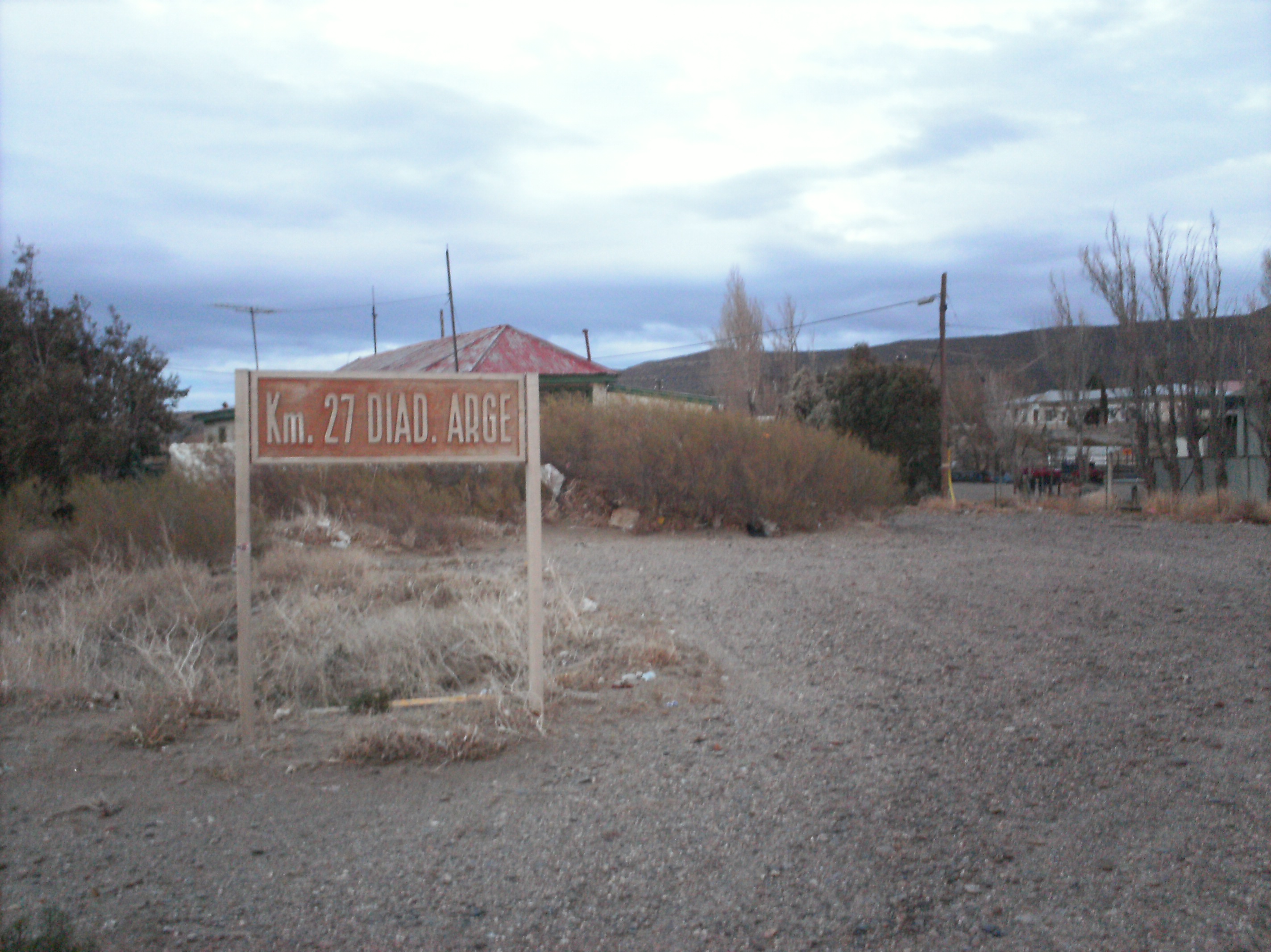 el barrio exibe su apodo